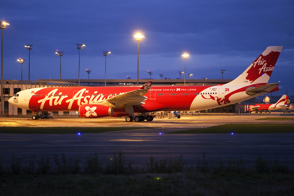 Toulouse